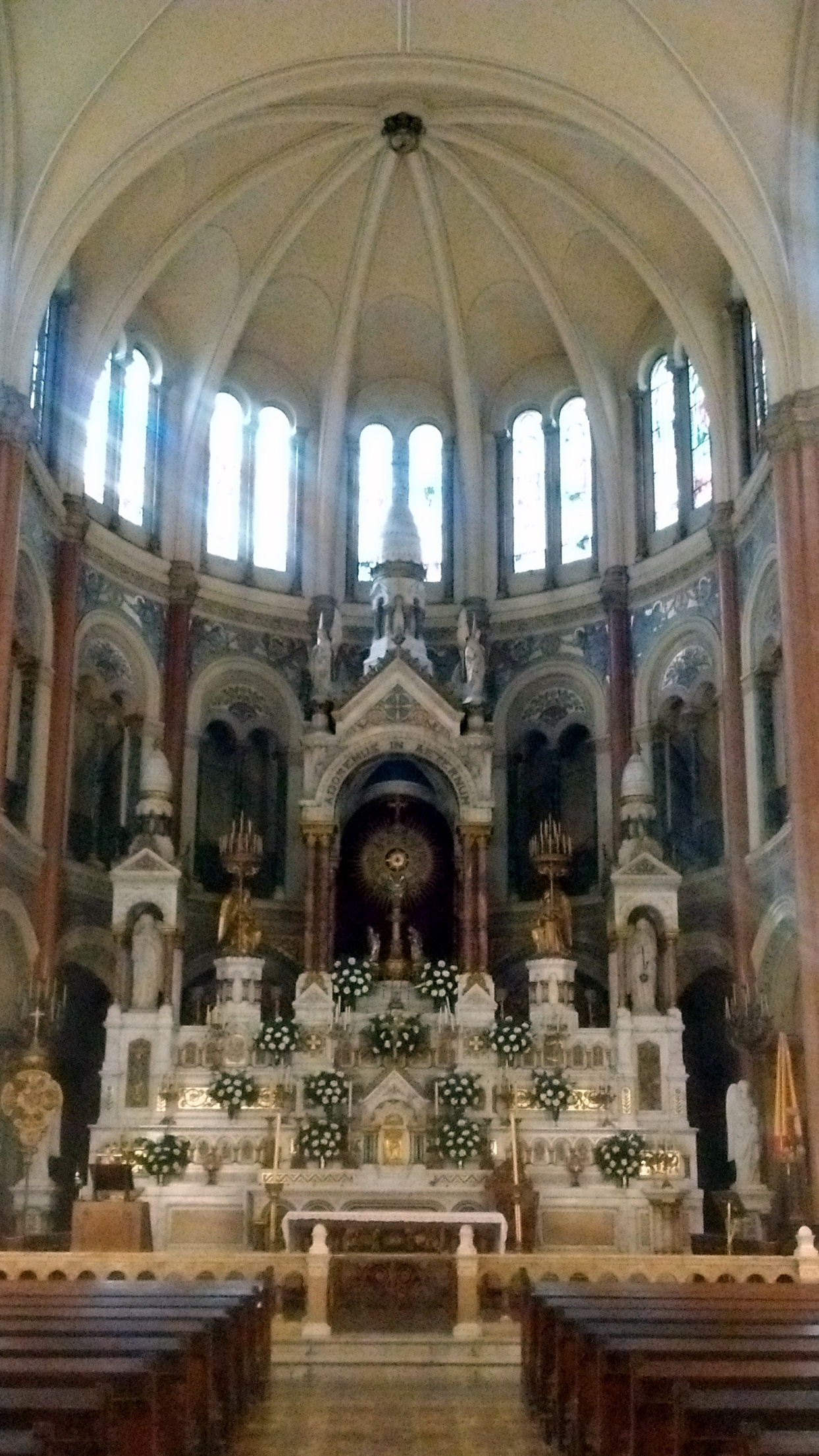 Basílica del Santísimo Sacramento en Retiro, ciudad de Buenos Aires, Argentina.